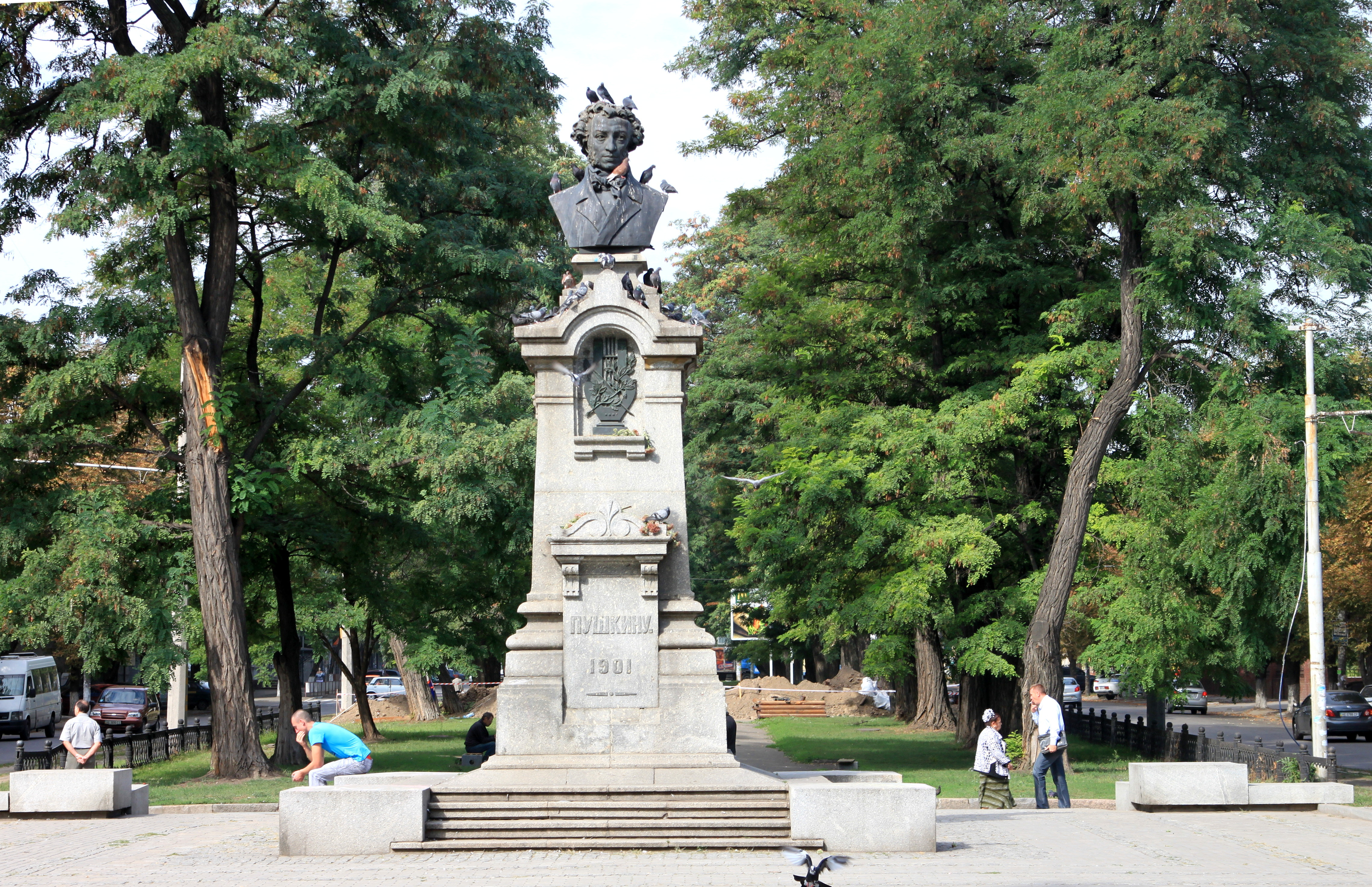 Пам’ятник О.С. Пушкіну, Дніпропетровськ, Красногвардійський район, просп. Пушкіна, 71